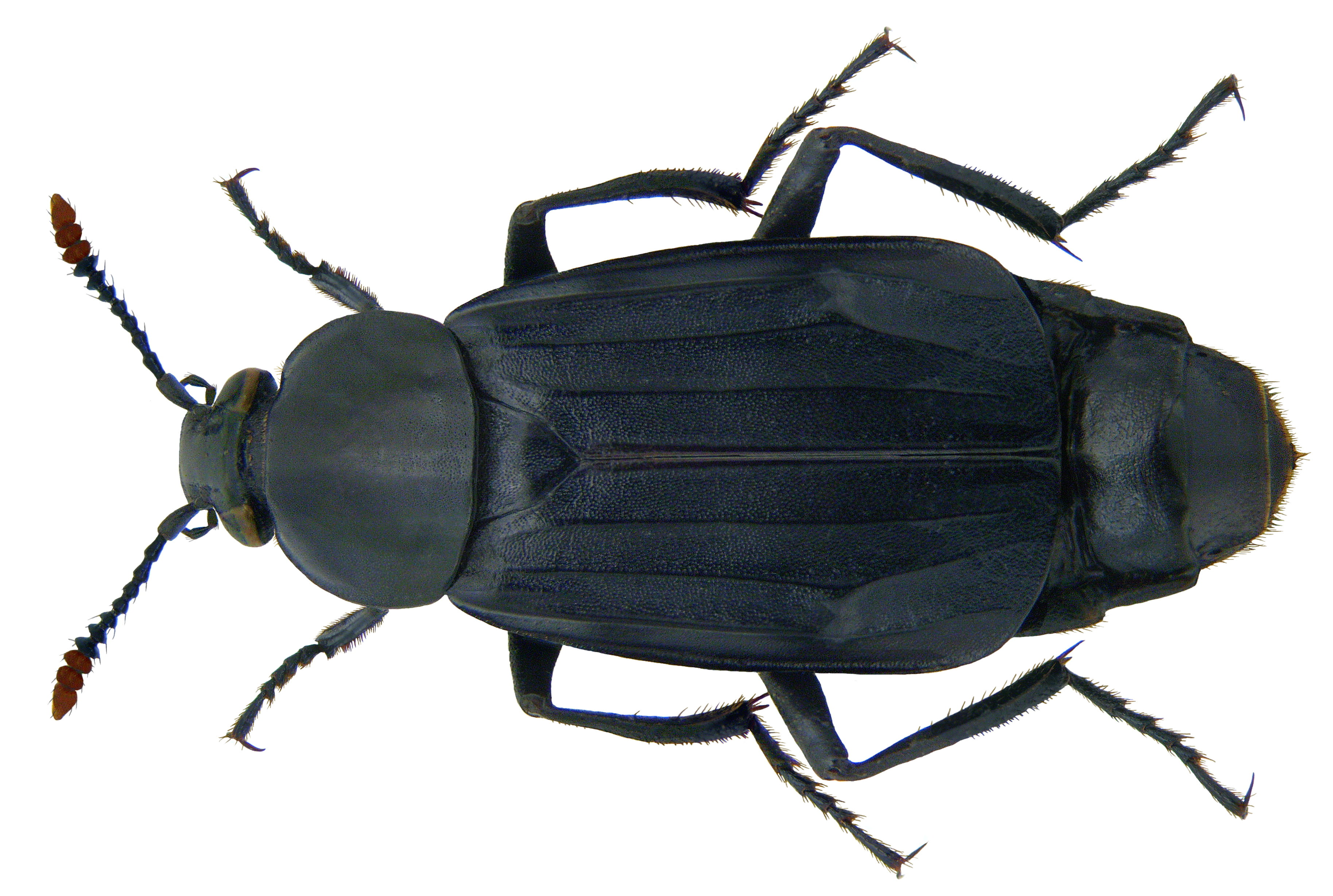 Familie: Silphidae Grösse: 15-25 mm Verbreitung: Europa bis zum Kaukasus Ökologie: necrophag Fundort: Korsika, Solenzara leg. det. U.Schmidt, 1973 Foto: U.Schmidt, 2009